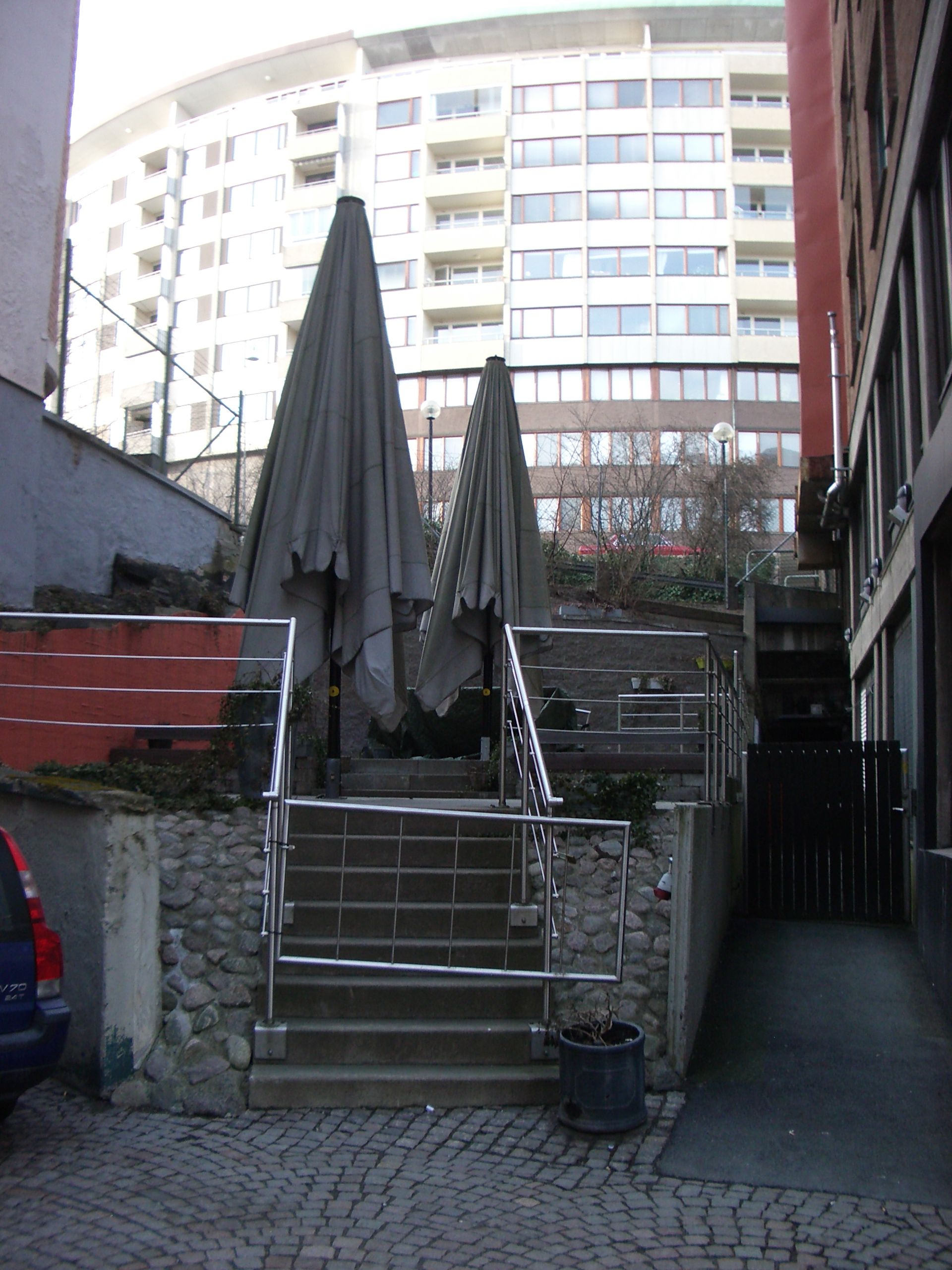 Södra Liden försvann som gata under 1970-talet. Återstoden av den södra delen av liden kan man se från Kungsgatan 10 och 12, uppemot Otterhällan.